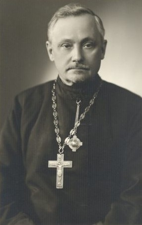 Vassili Martinson, eesti teoloog ja raamatukogutegelane